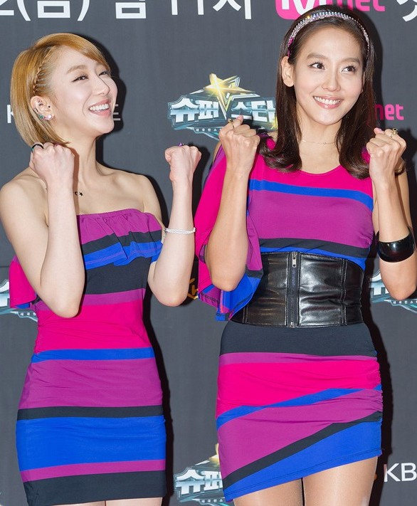 천상지희. 슈퍼스타K 3 하이라이트 시사회 레드카펫 행사에서.